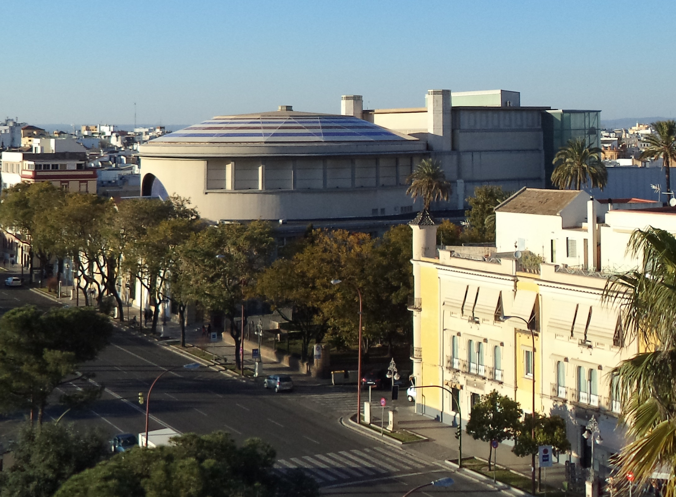 Exterior del Teatro de la Maestranza desde la Torre del Oro